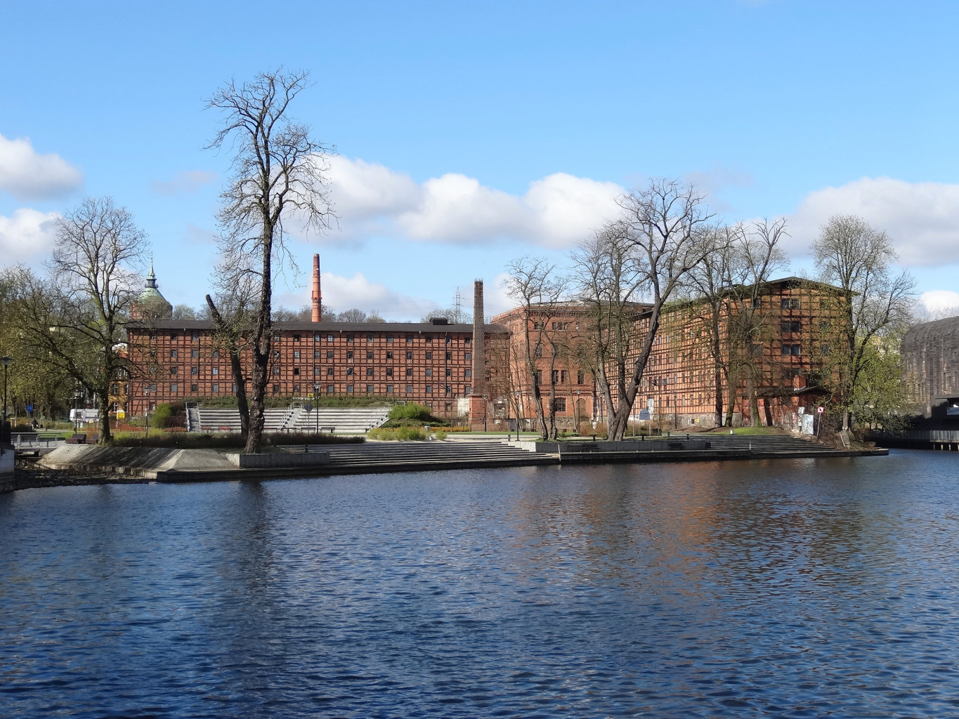 Młyny Rothera (zbud. 1850 r.) na Wyspie Młyńskiej w Bydgoszczy